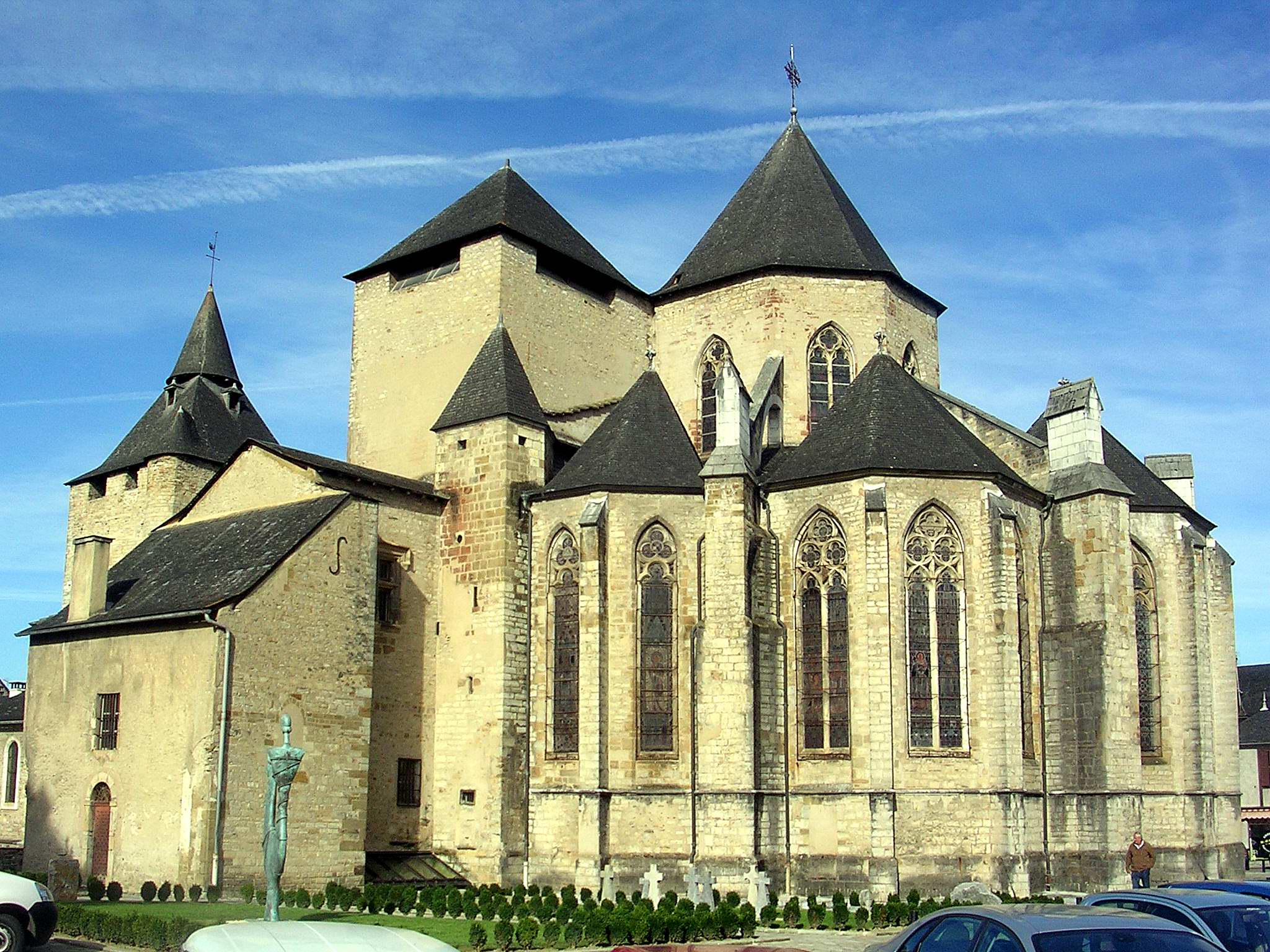 Cathédrale Sainte-Marie d'Oloron,dans le département français des Pyrénées-Atlantiques